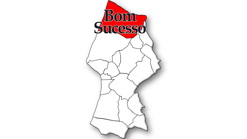 População